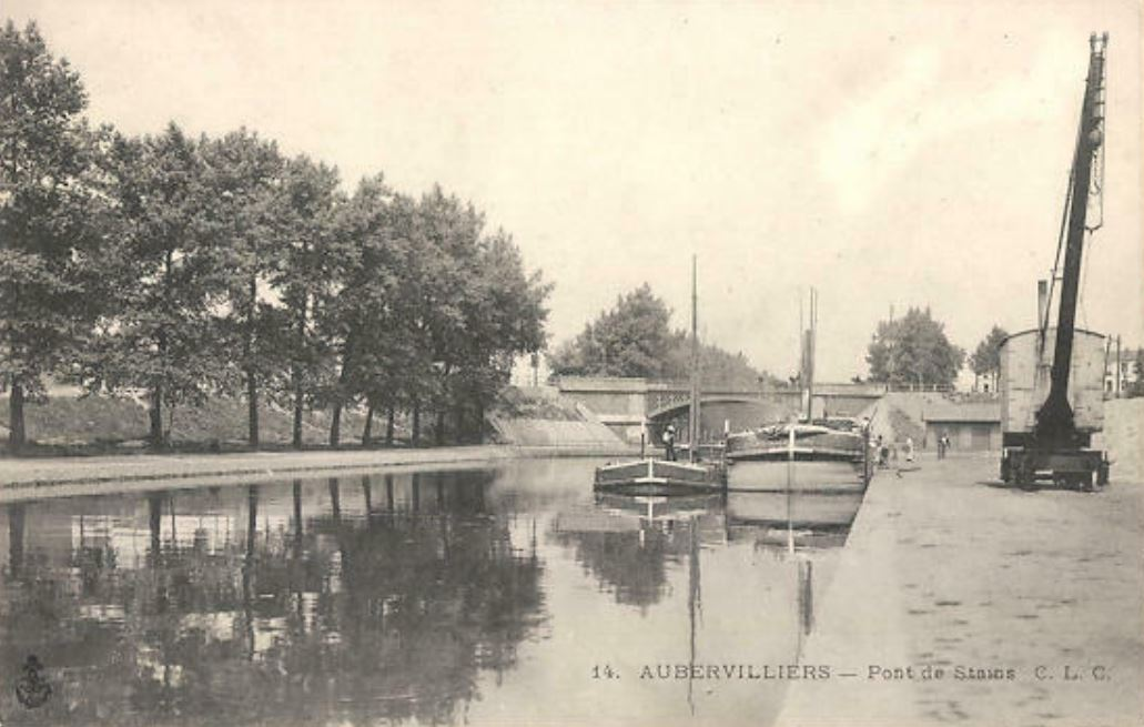 Aubervilliers.Pont de Stains et grue